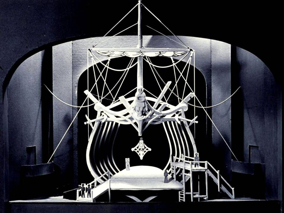 ההולנדי המעופף